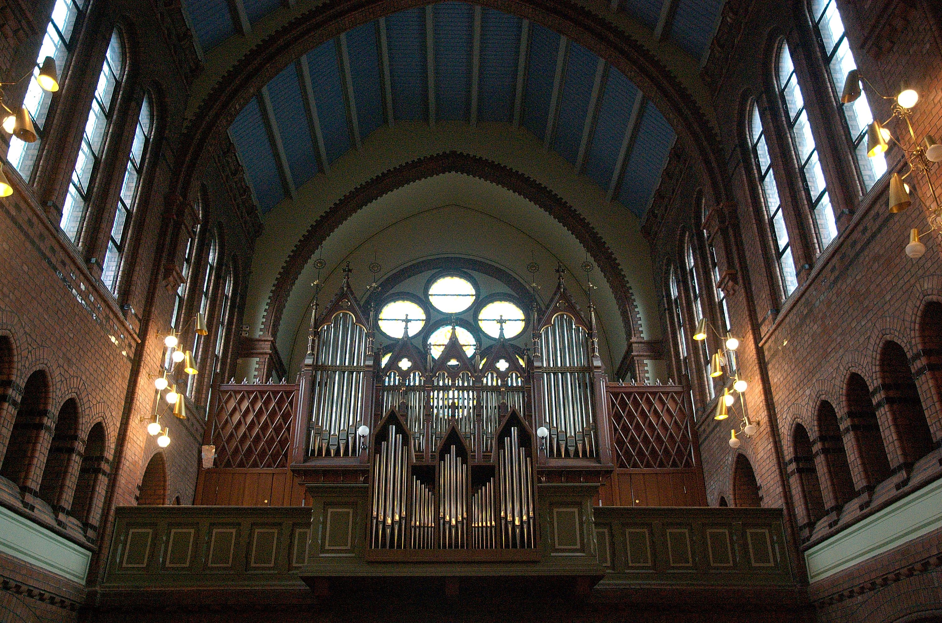 Orgelet i Sagene kirke.